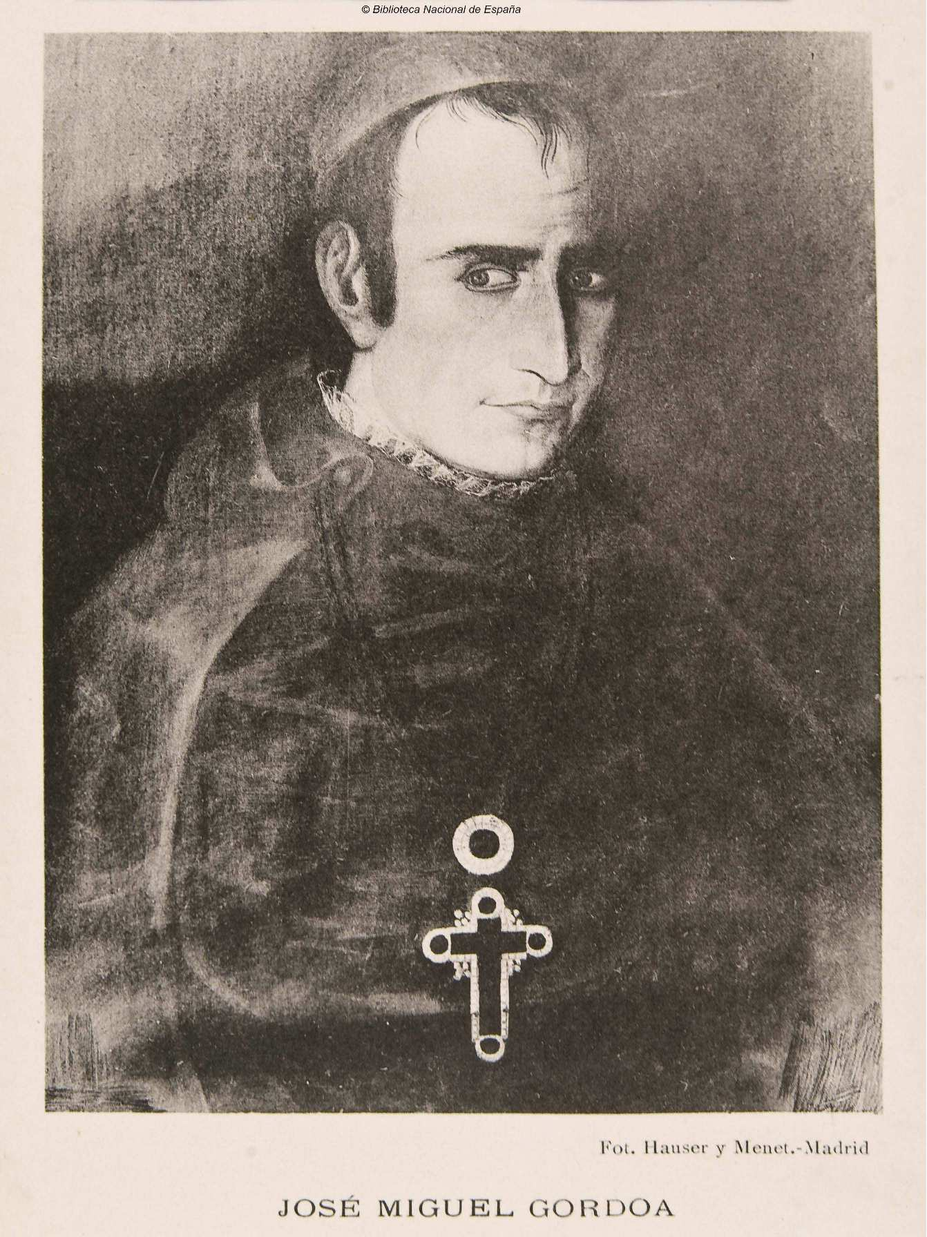 Retrato de José Miguel Gordoa. Último discurso de la Cortes el 14 de septiembre de 1813. Fototipia de Hauser y Menet, Madrid. Biblioteca Nacional de España.